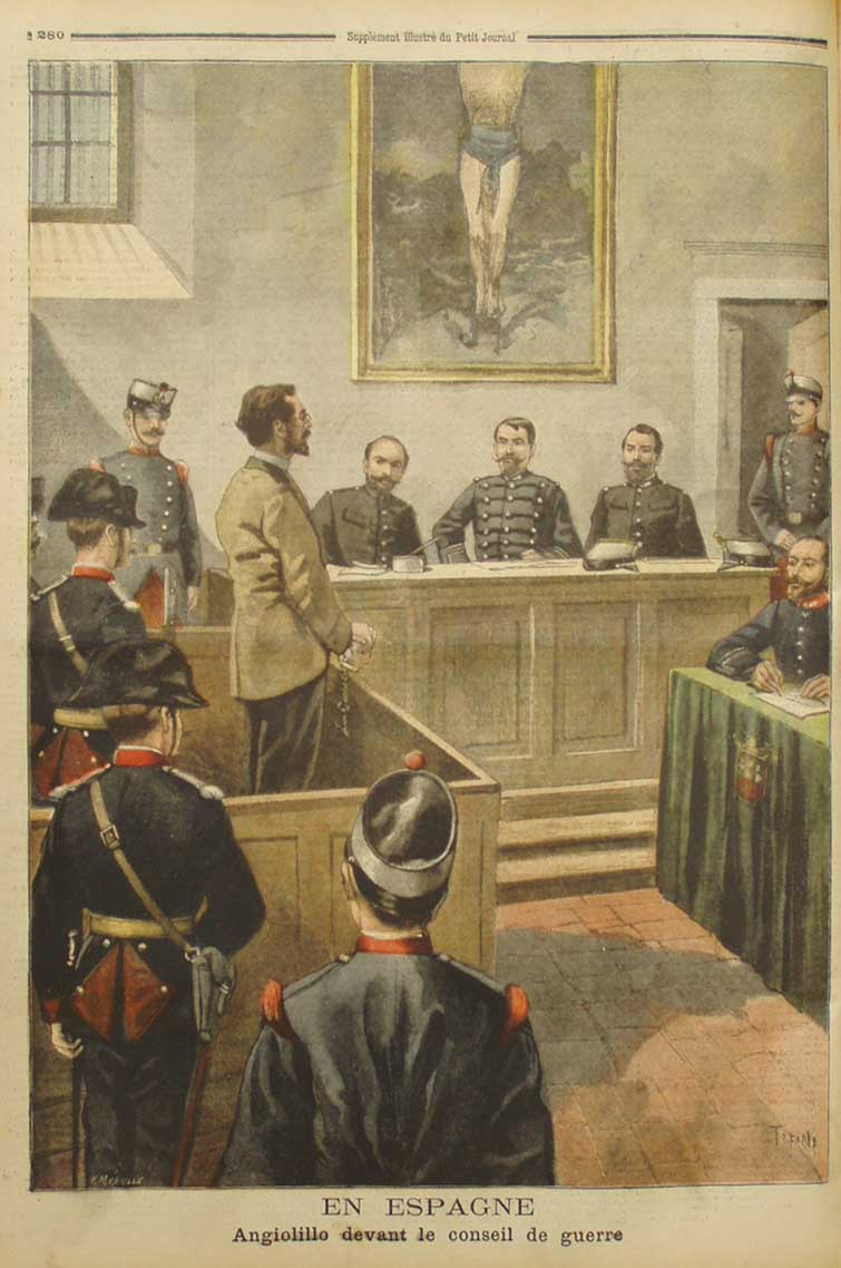 O julgamento na corte militar espanhola do anarquista italiano Michelle Angiolillo.